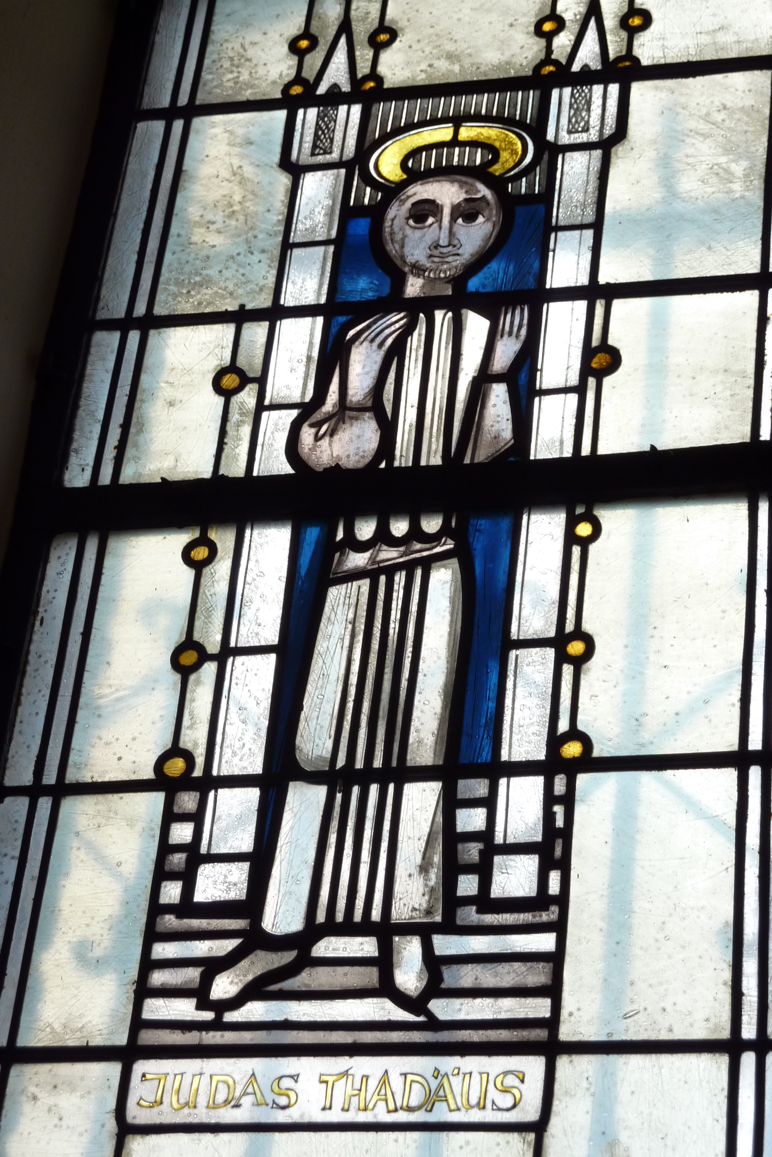 Bleiglasfenster in der katholischen Pfarrkirche St. Lambertus in Bedburg